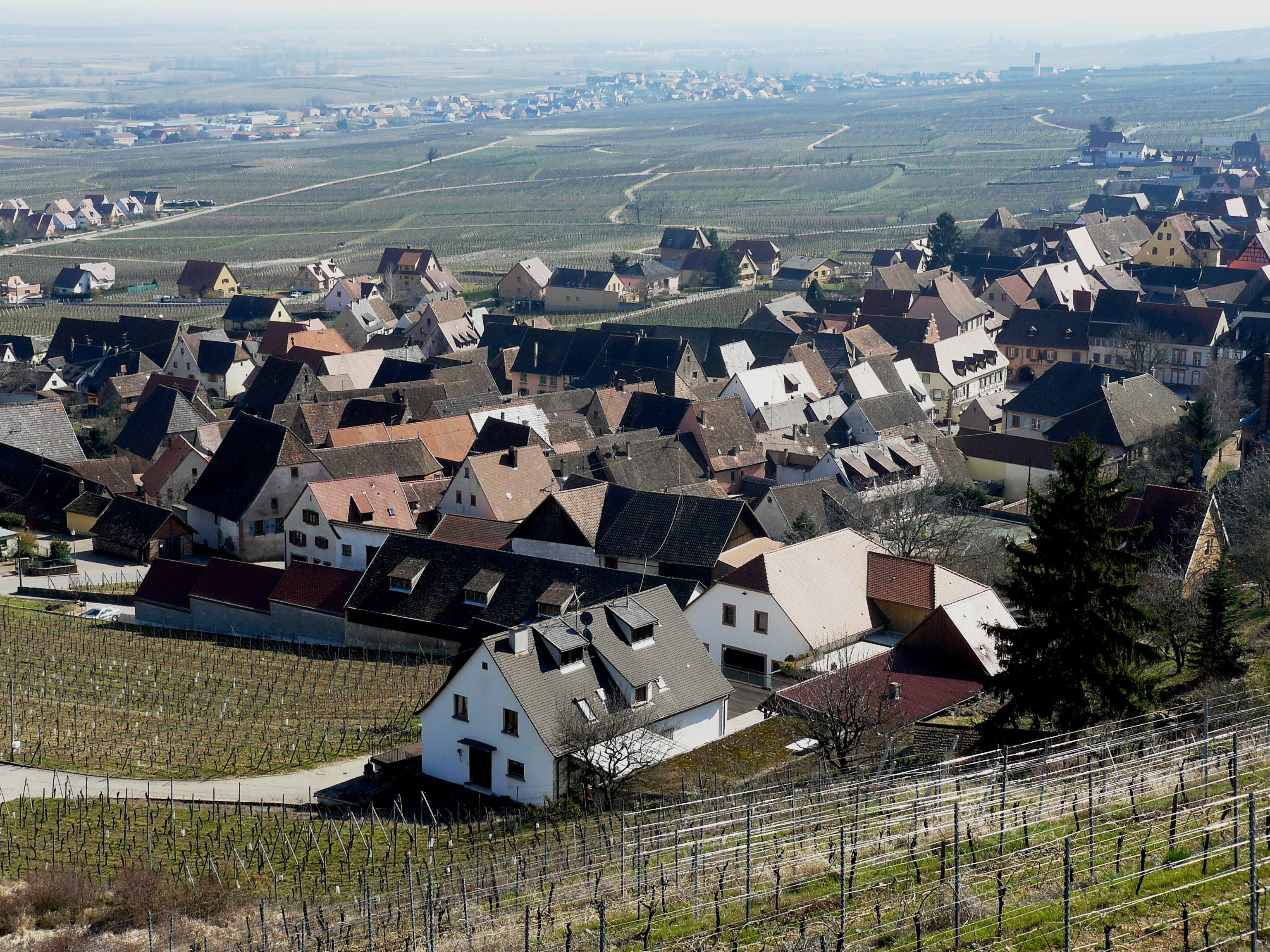 Une partie du village de Gueberschwihr vu depuis les hauteurs